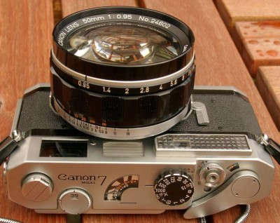 Canon 7 mit 0.95/50mm (1962)